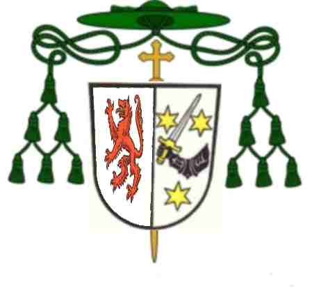 Wappen Karl Joseph Freiherr von Riccabona 1783-1839, Bischof Von Passau (1826-1839)